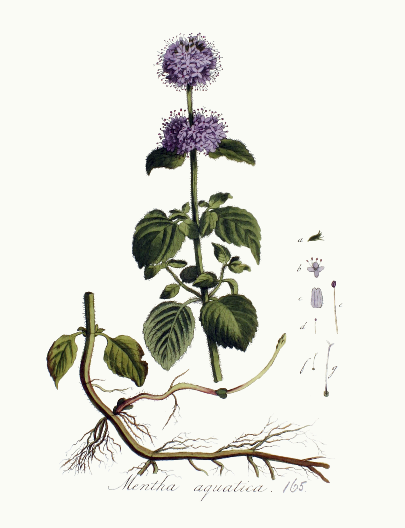 Mentha aquatica L. subsp. ortmanniana (Opiz) Lemke